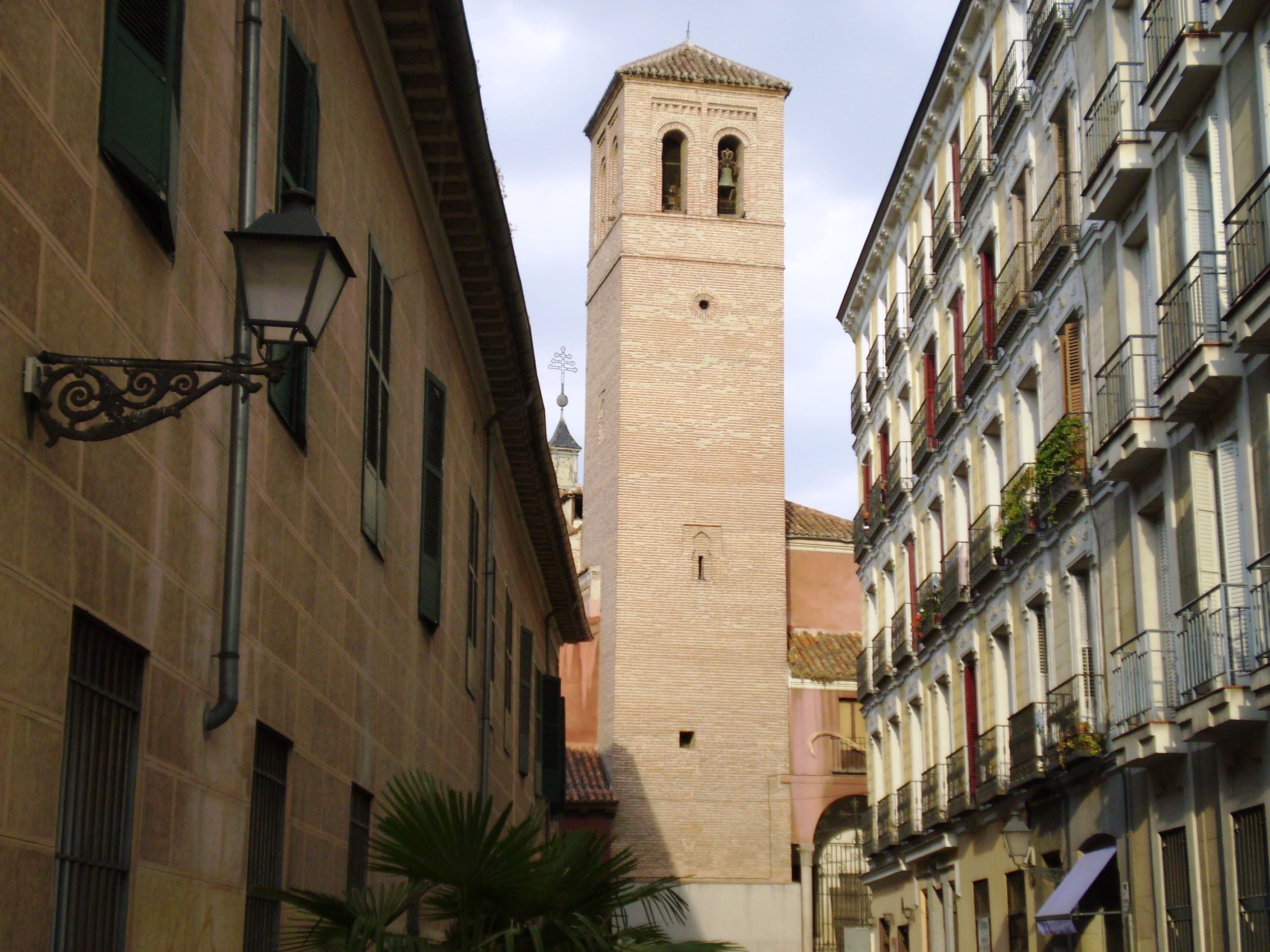 Iglesia de San Pedro el Viejo, Madrid, Spain